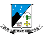 Bandeira de Santana do Matos-RN, Brasil